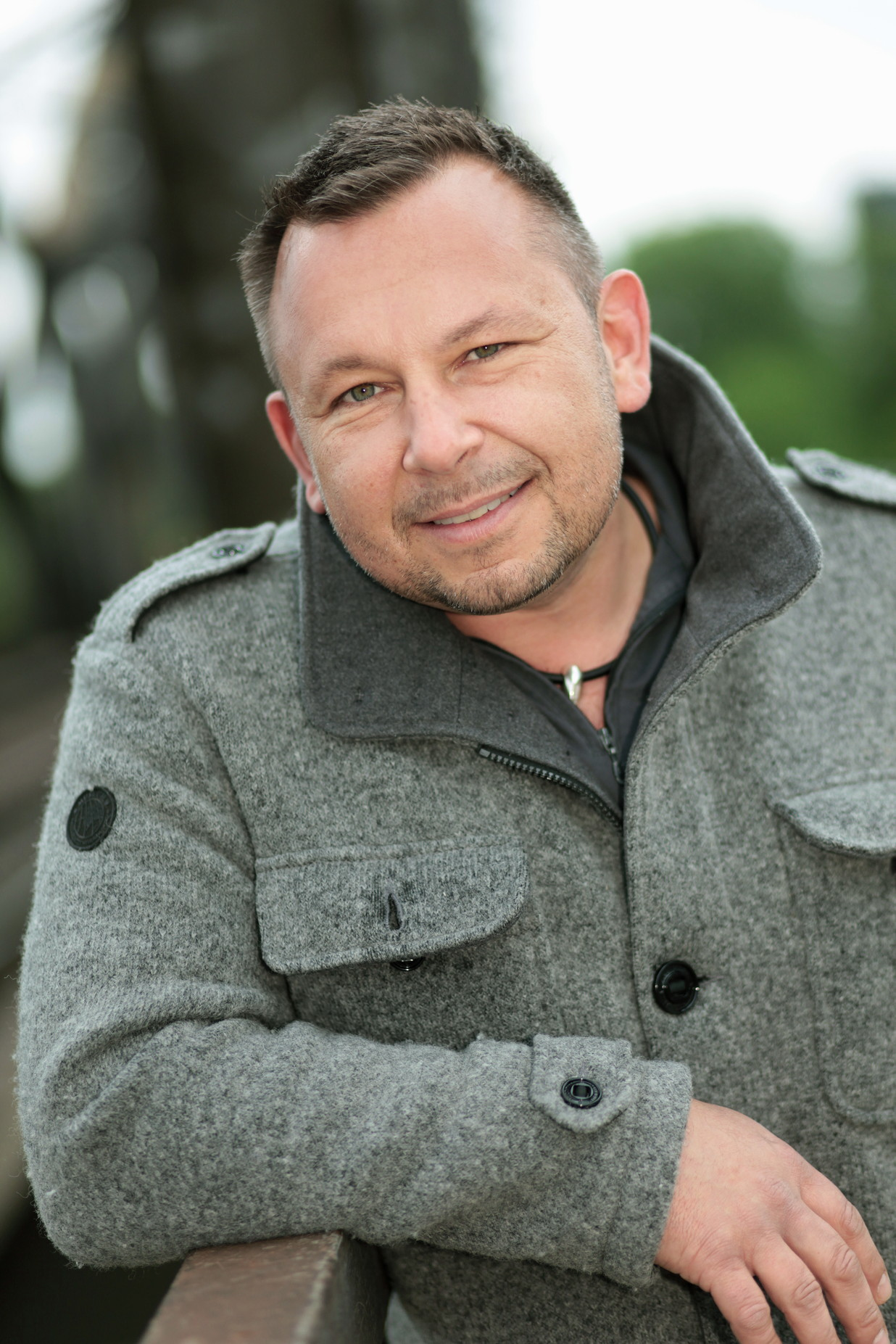 Portraitfoto von Alf Leue im Jahre 2014